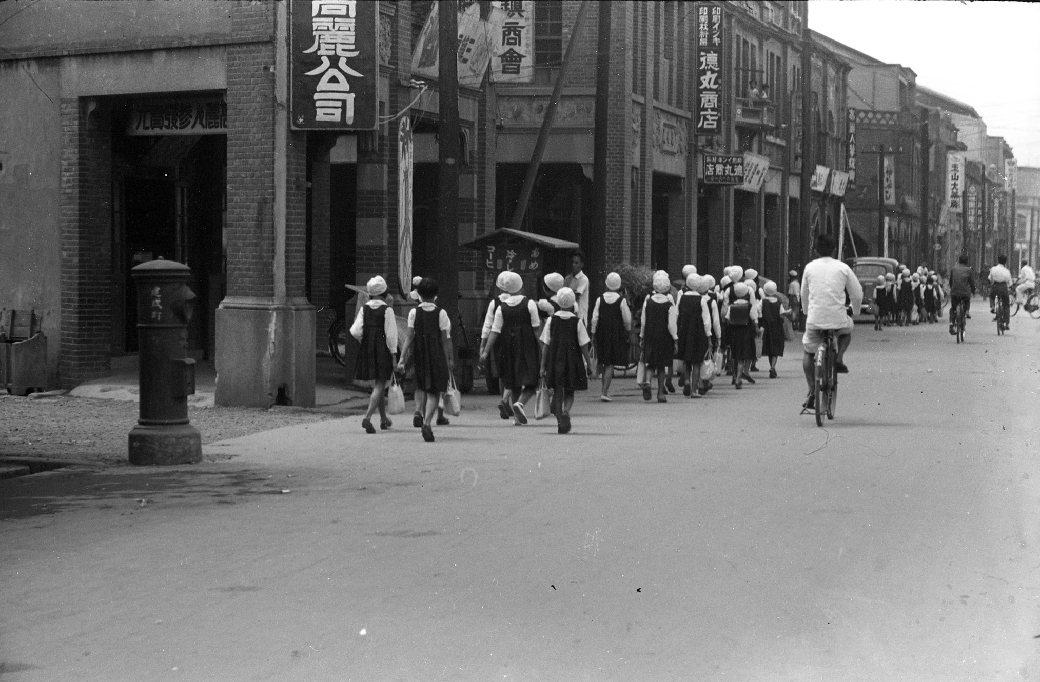 臺北大稻埕街景